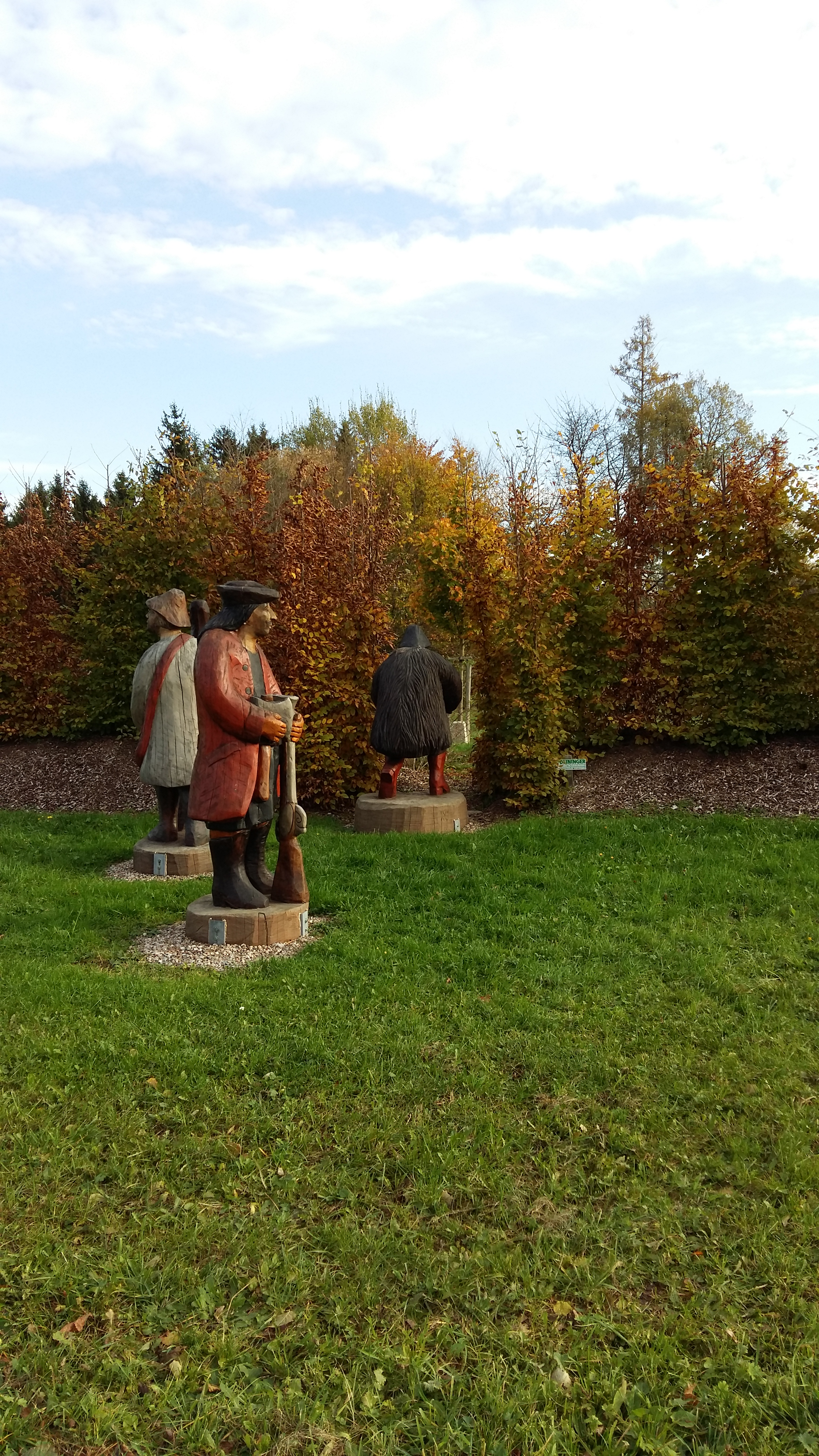 Statues en chêne représentant les brigands de Mainhardt